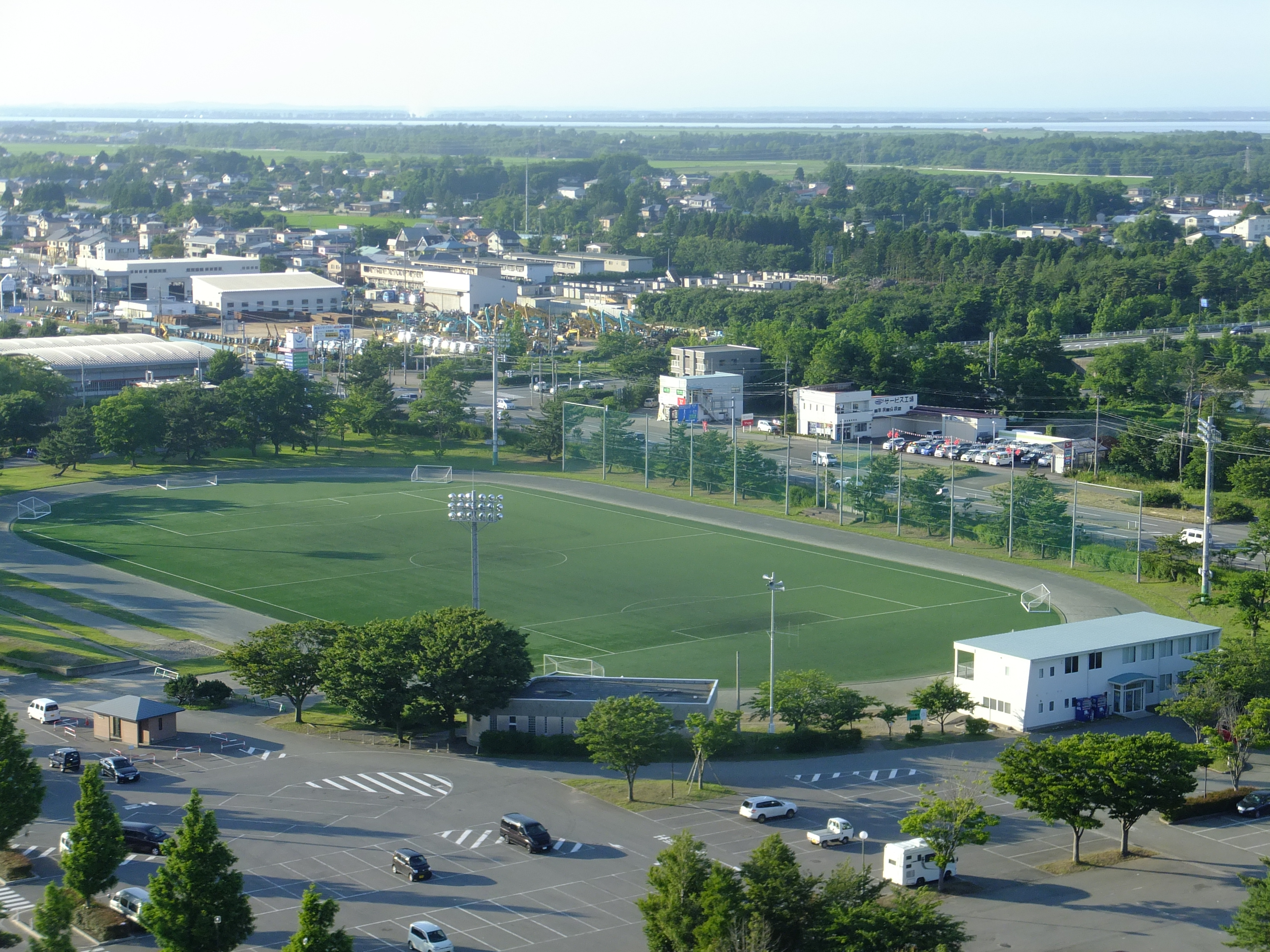 道の駅てんのう、天王スカイタワーからの眺め 秋田県フットボールセンター